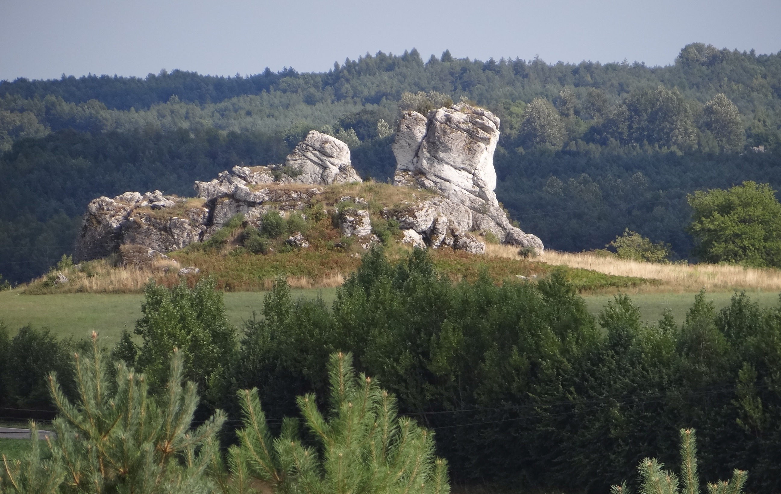 Gurdziel. Widok z Podzamcza (zoom)